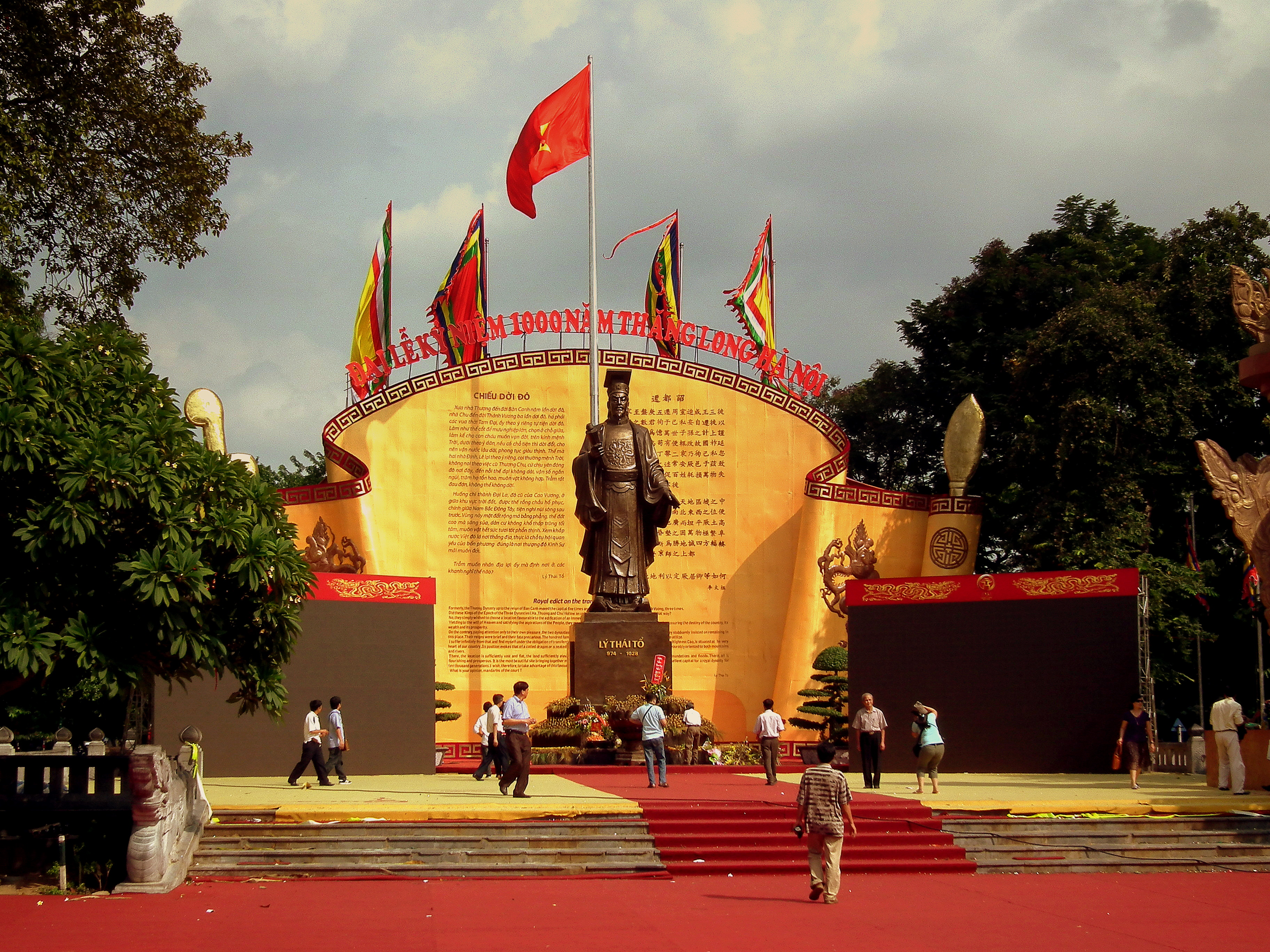 Lý Thái Tổ monument, Oct 2010